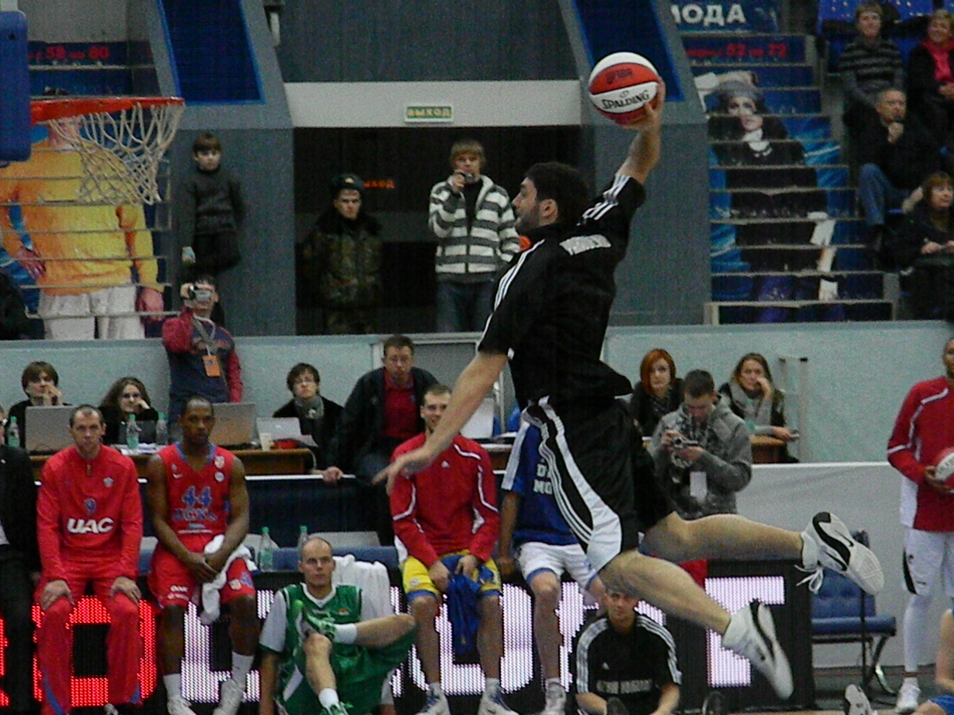 Slam-dunk by Artyom Yakovenko at all-star PBL game 2011